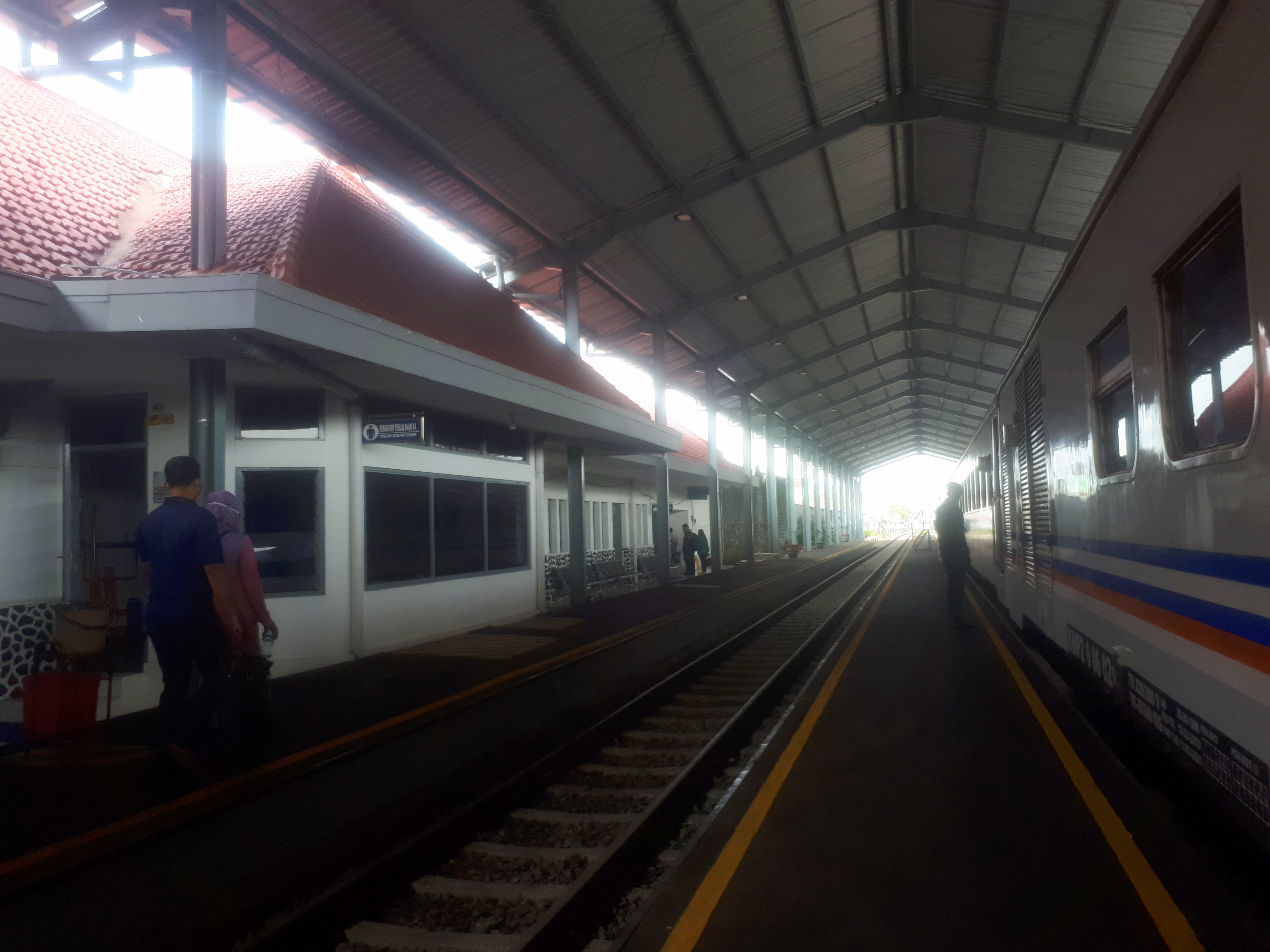 Stasiun Rambipuji setelah dilakukan penambahan kanopi, 2020